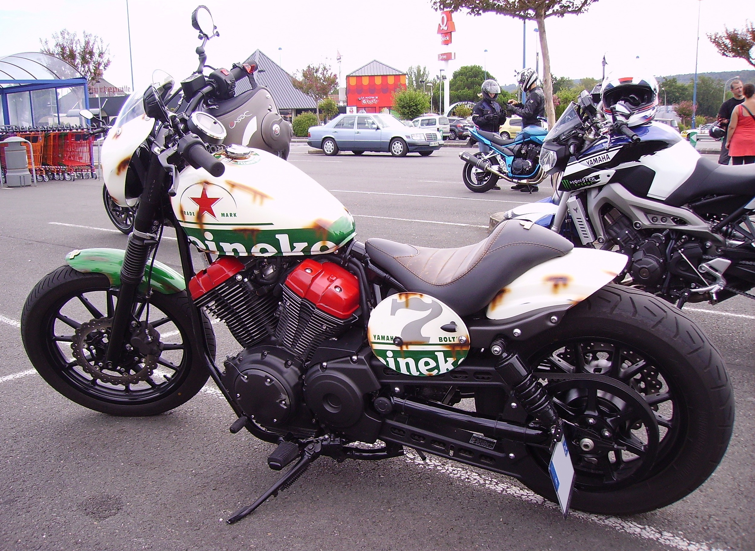 Yamaha XV 950 R « Bolt » avec décoration Heineken suggérée.